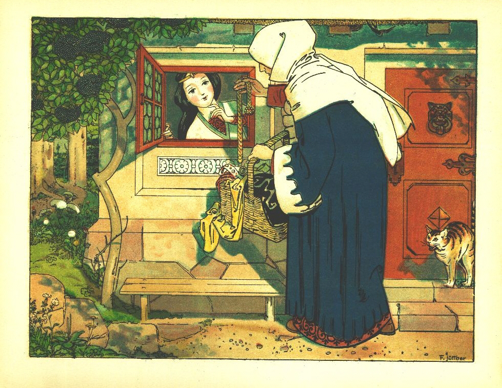 Franz Jüttner (1865–1925): Illustration from Sneewittchen, Scholz' Künstler-Bilderbücher, Mainz 1905